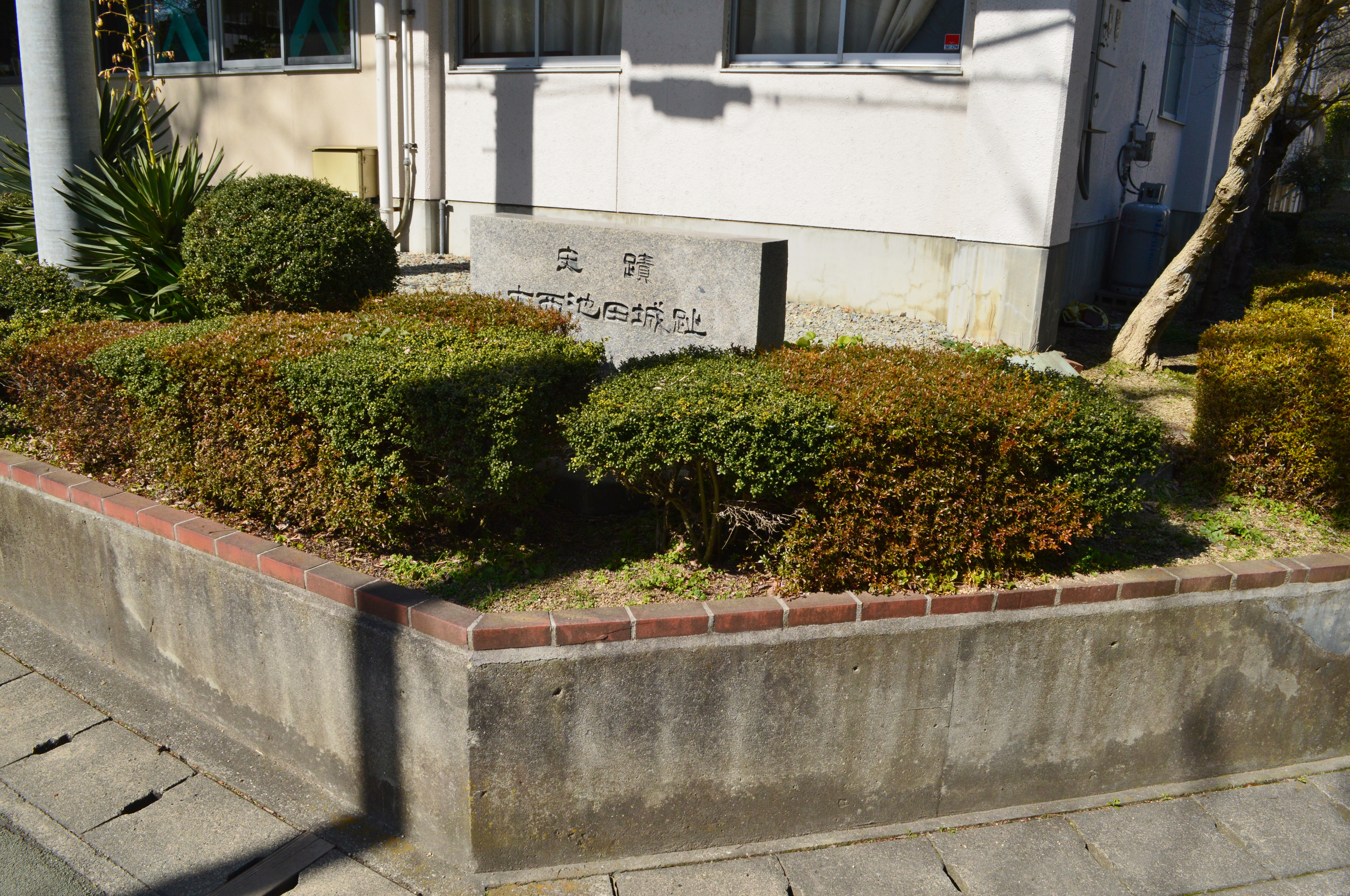 大西池田城跡 石碑